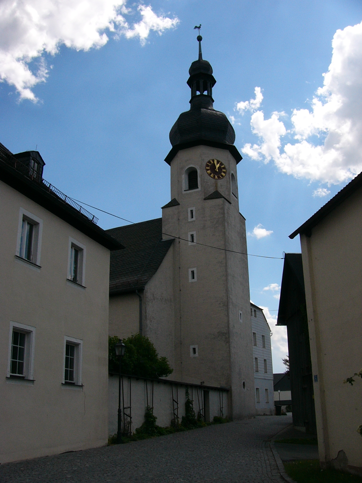 Außenansicht der Kirche